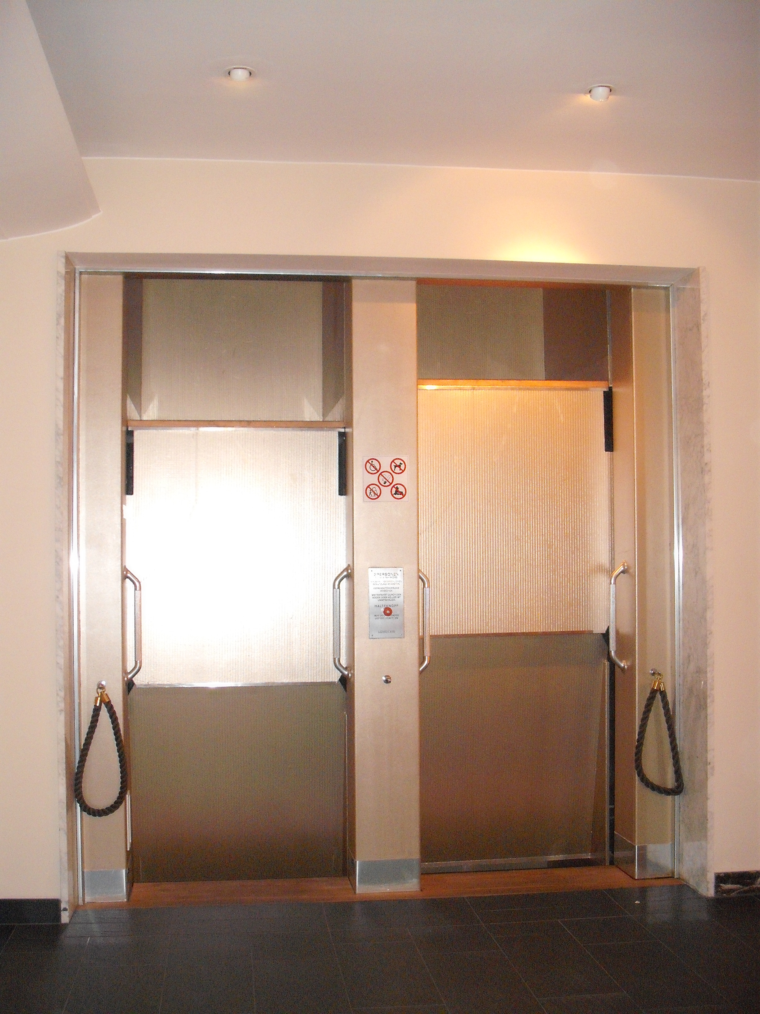 Paternoster Aufzug im Hotel Flemings Frankfurt